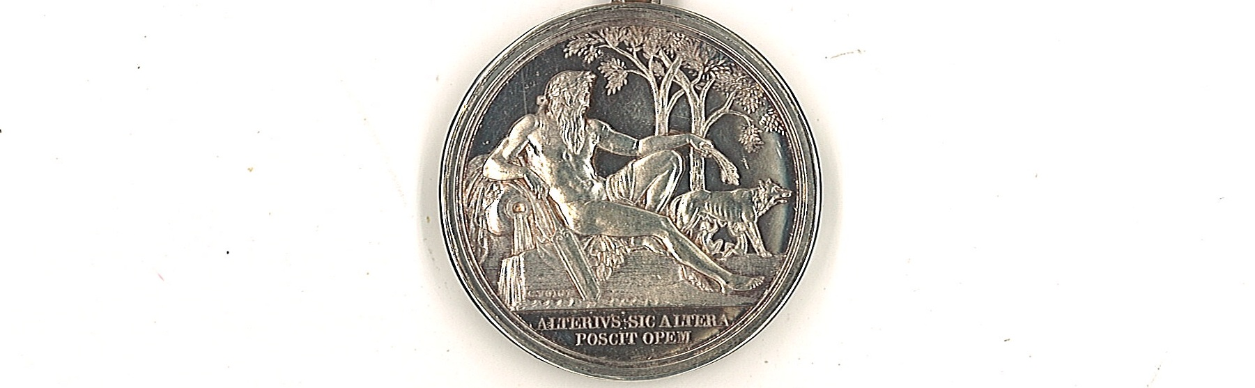 Fotografia di una medaglia d'argento della Pontificia Accademia Tiberina